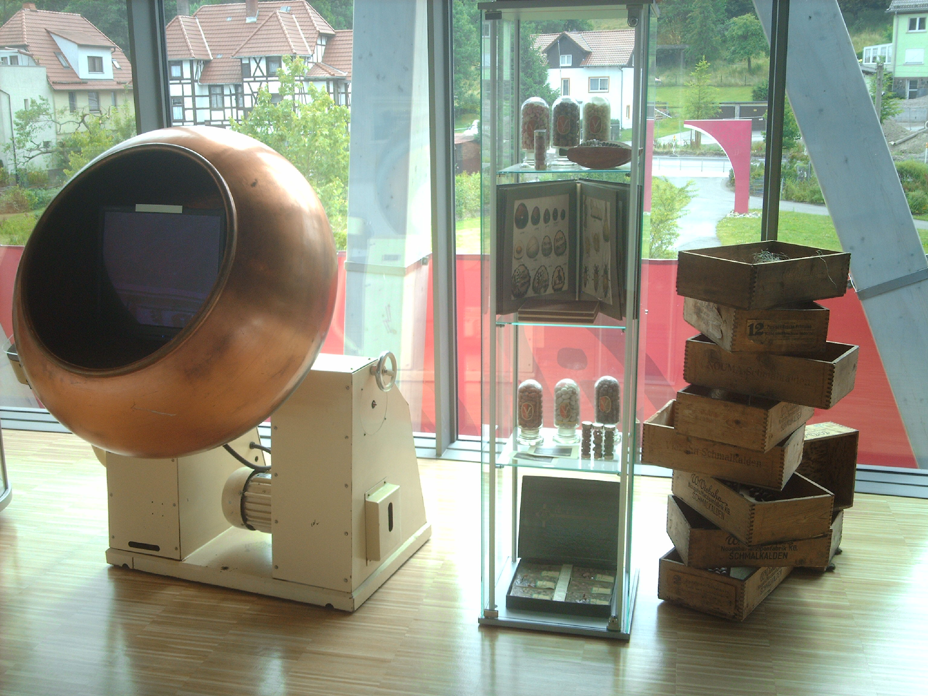 Viba Nougat-Welt in Schmalkalden 3